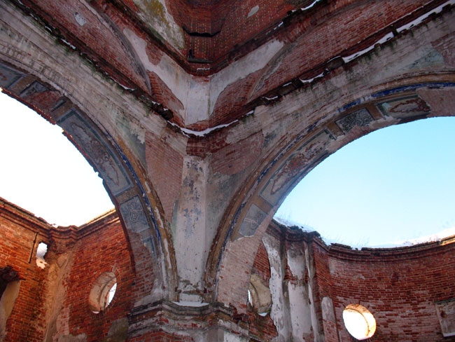 Леніна. Царква Мікалая Цудатворца